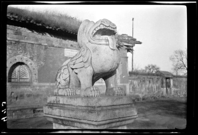 北京功德寺